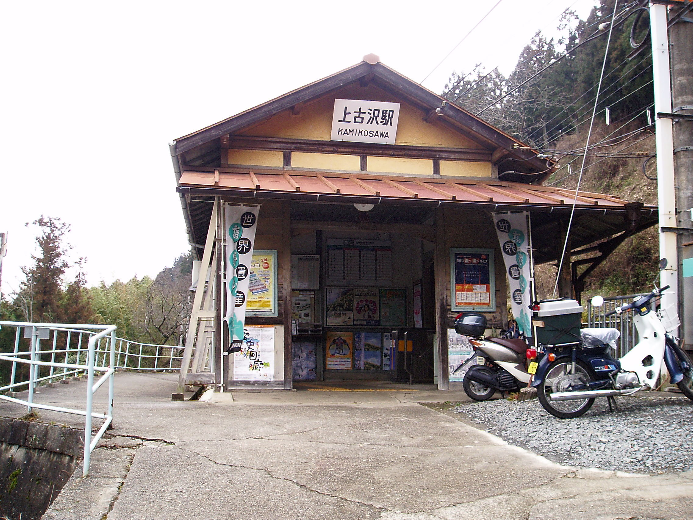 南海高野線 上古沢駅駅舎